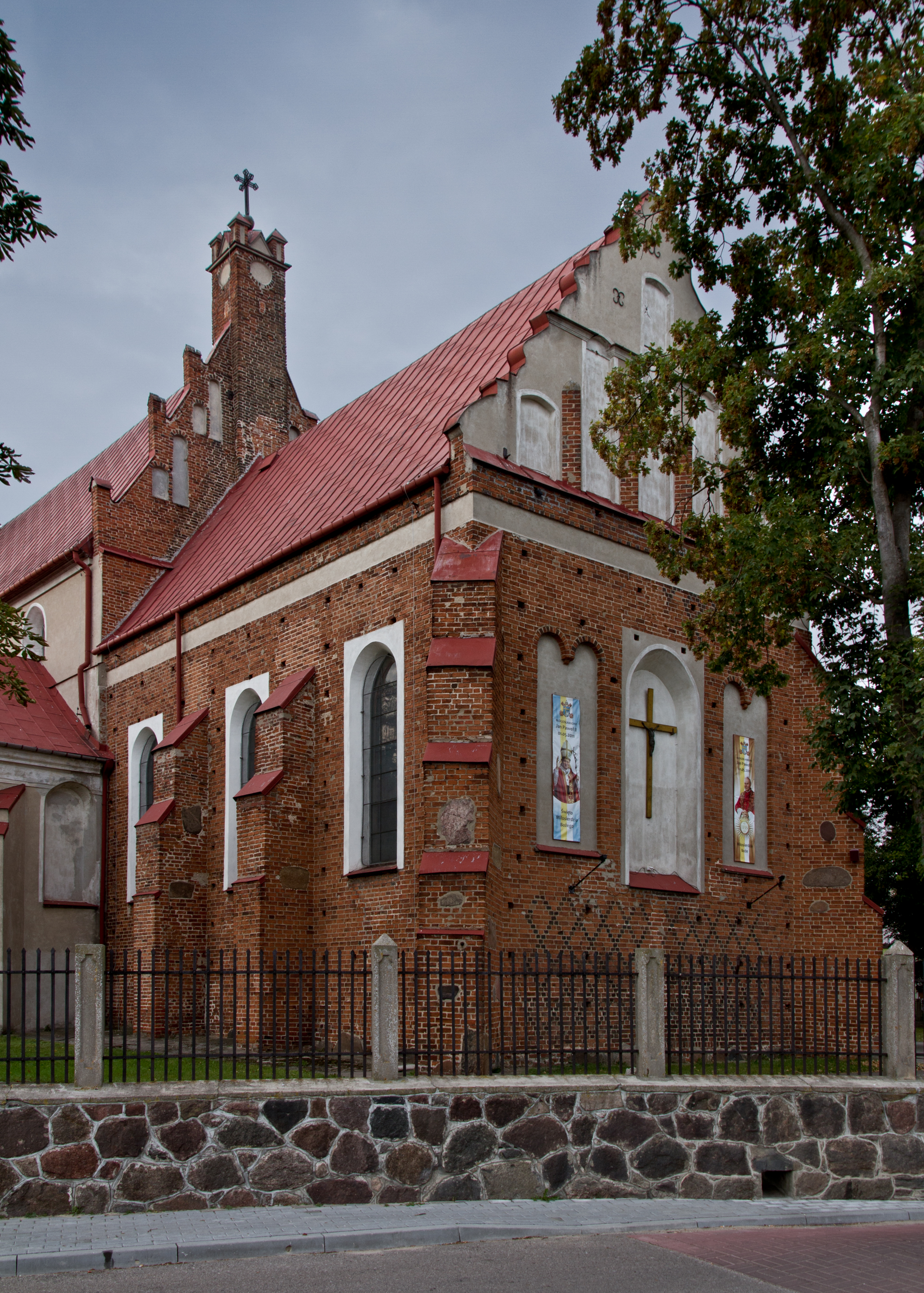 Maków Mazowiecki, kościół par. p.w. Bożego Ciała, XVI